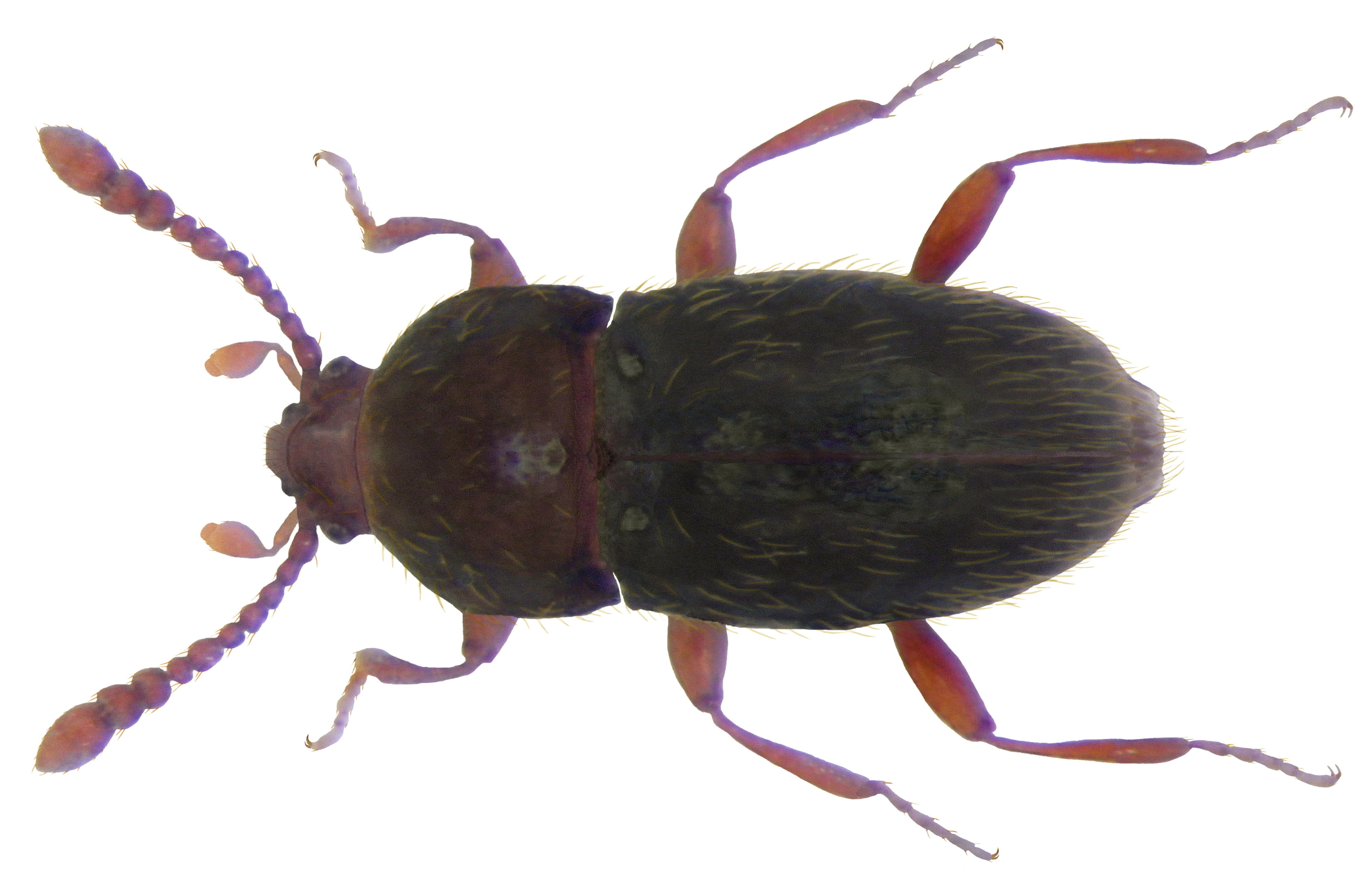 Familie: Scydmaenidae Groesse: 1,3-1,5 mm Verbreitung: Europa Ökologie: in faulenden Pflanzenabfällen und in Humus unter Bäumen Fundort: Germania, Hessen, Gernsheim leg. A.Skale, 2004; det. W.Apfel, 2004 Photo: U.Schmidt, 2009